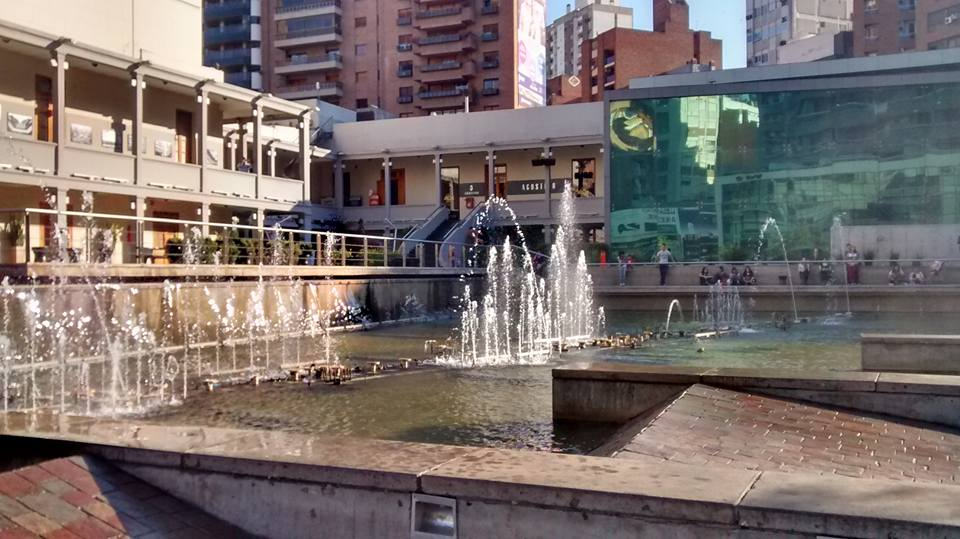 El paseo del buen pastor cuenta con una fuente de aguas danzantes que gracias a su sistema de música e iluminación se convierte en un lugar atractivo muy frecuentado por los visitantes.